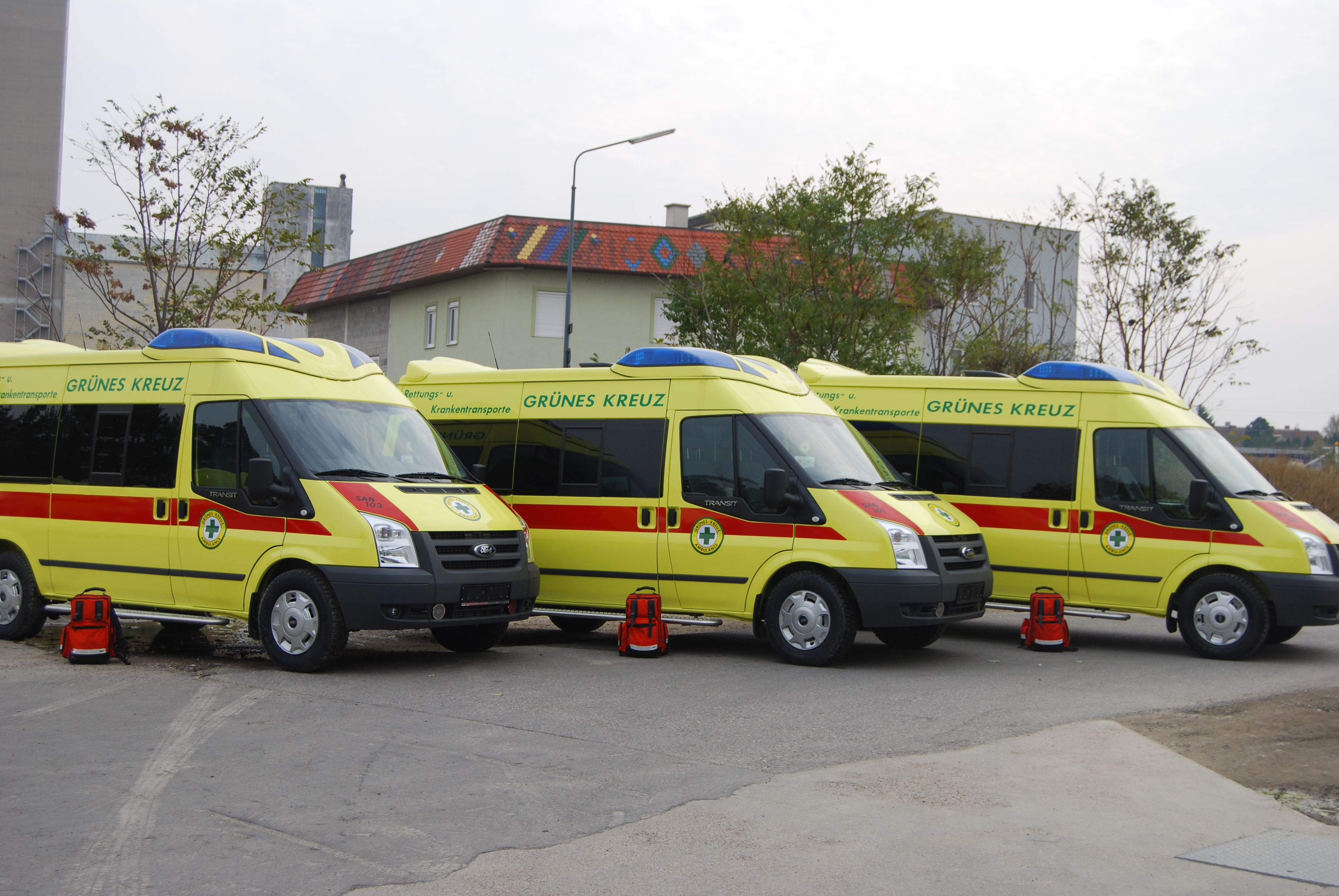 Krankentransportwagen des GRÜNEN KREUZ auf Basis Ford Transit. Ausgebaut von Ambulanzmobil Schönebeck und nach ÖNORM EN 1789 eingerichtet.